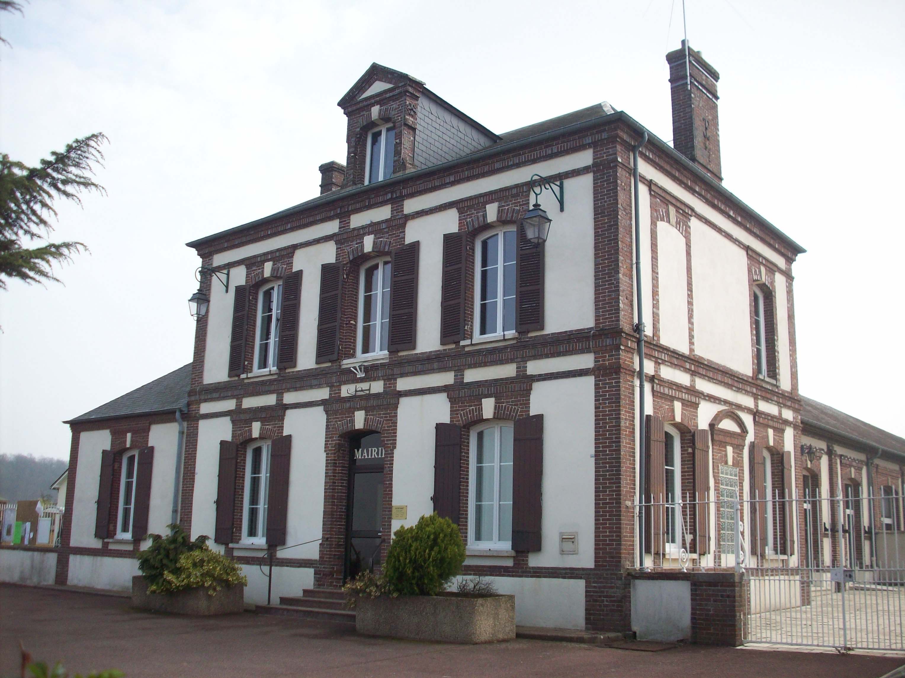 Mairie d'Arnières-sur-Iton.